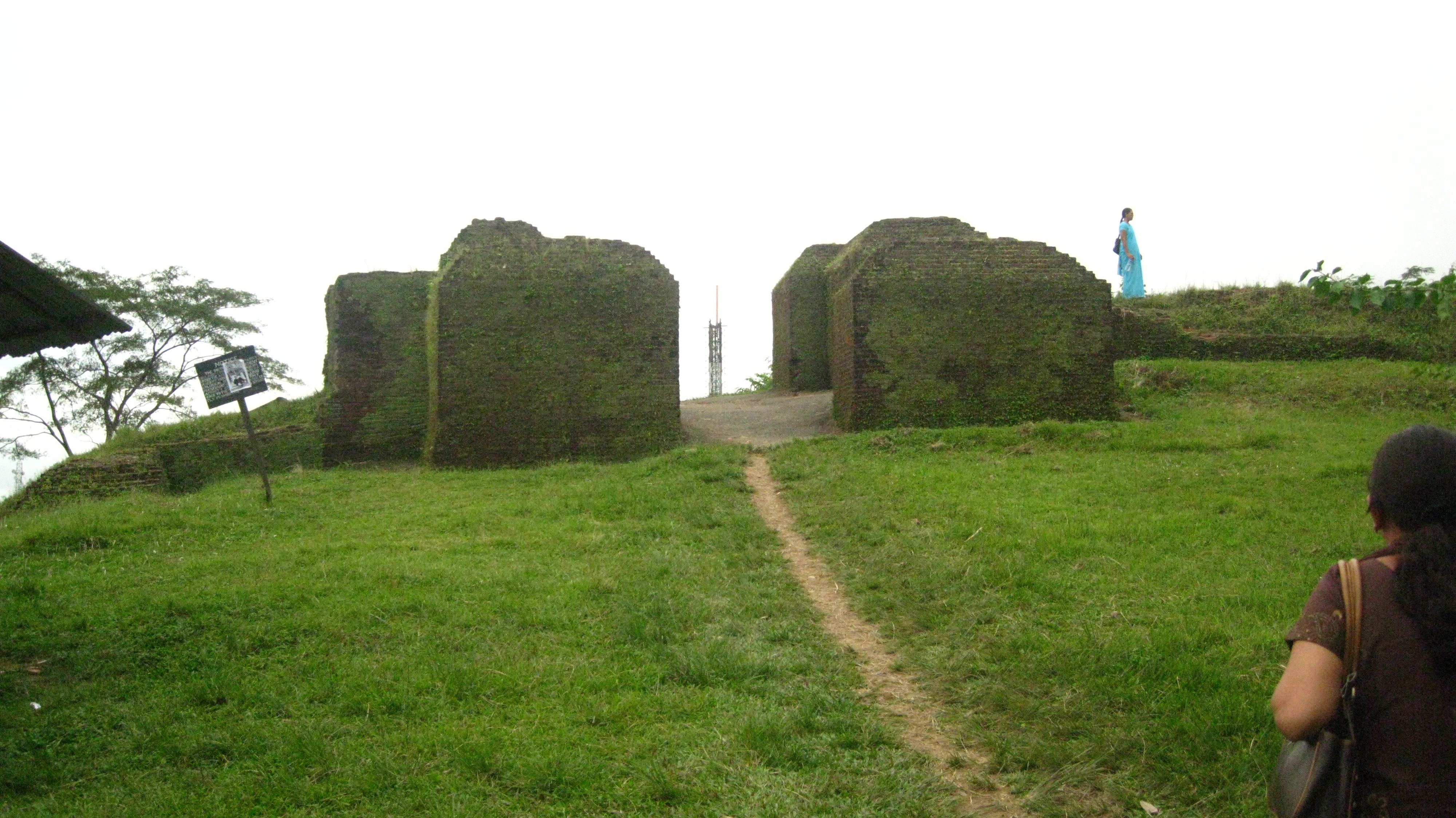 ईटा फ़ोर्ट, ईटानगर